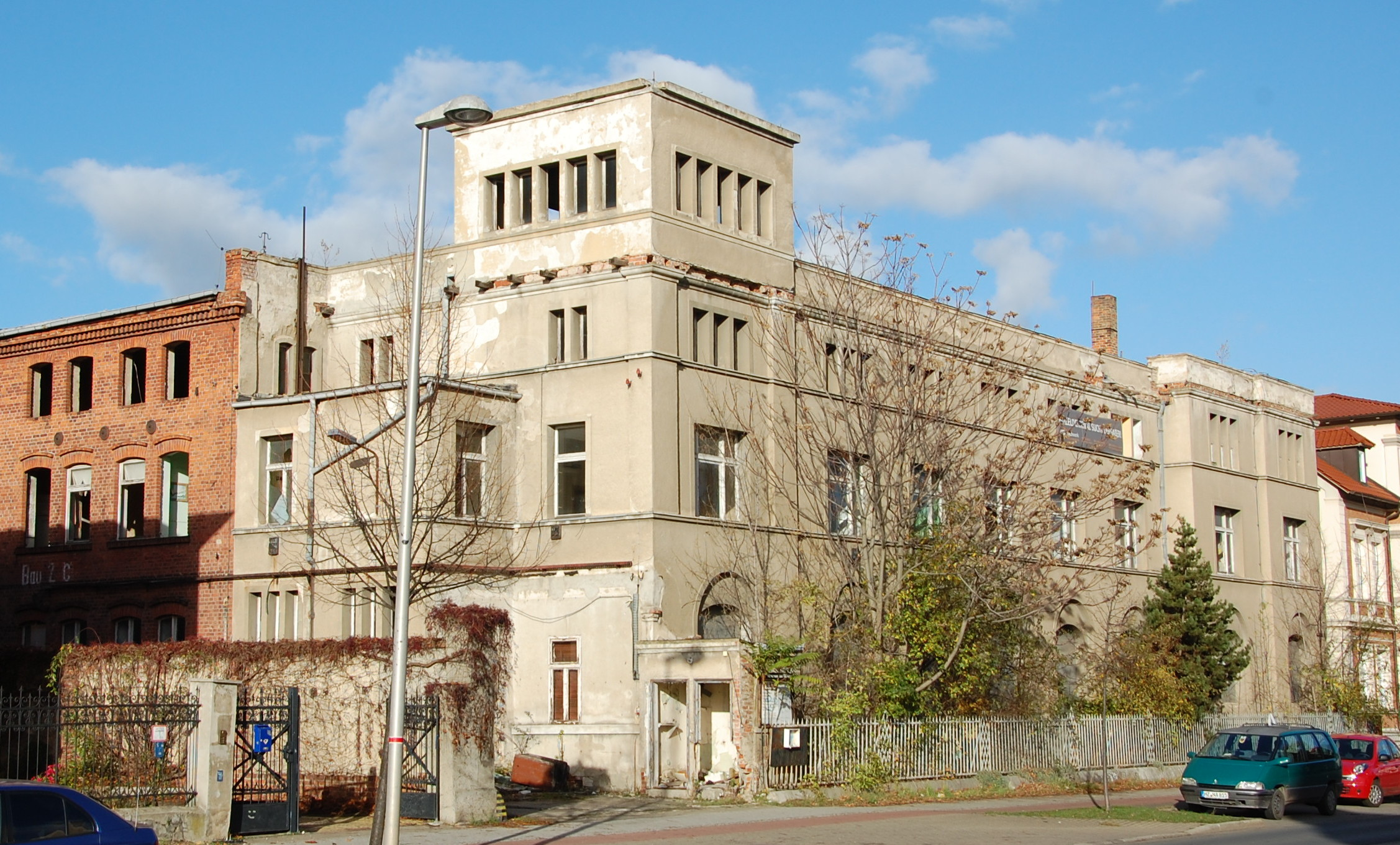 Haus Harzweg 12 in Quedlinburg